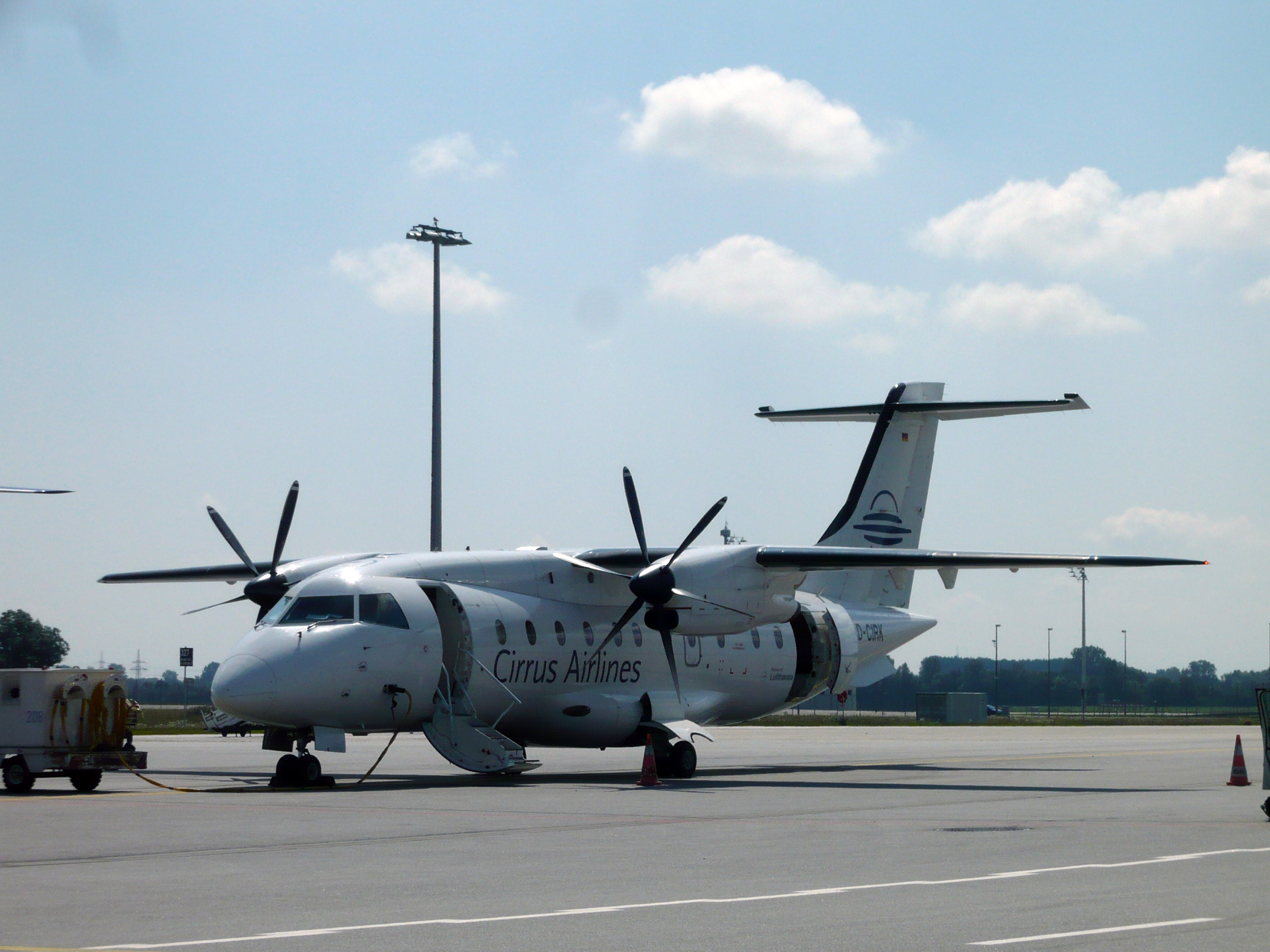 Dornier 328 auf einer Abstellposition am Vorfeld 3 des Flughafen München Franz Josef Strauß